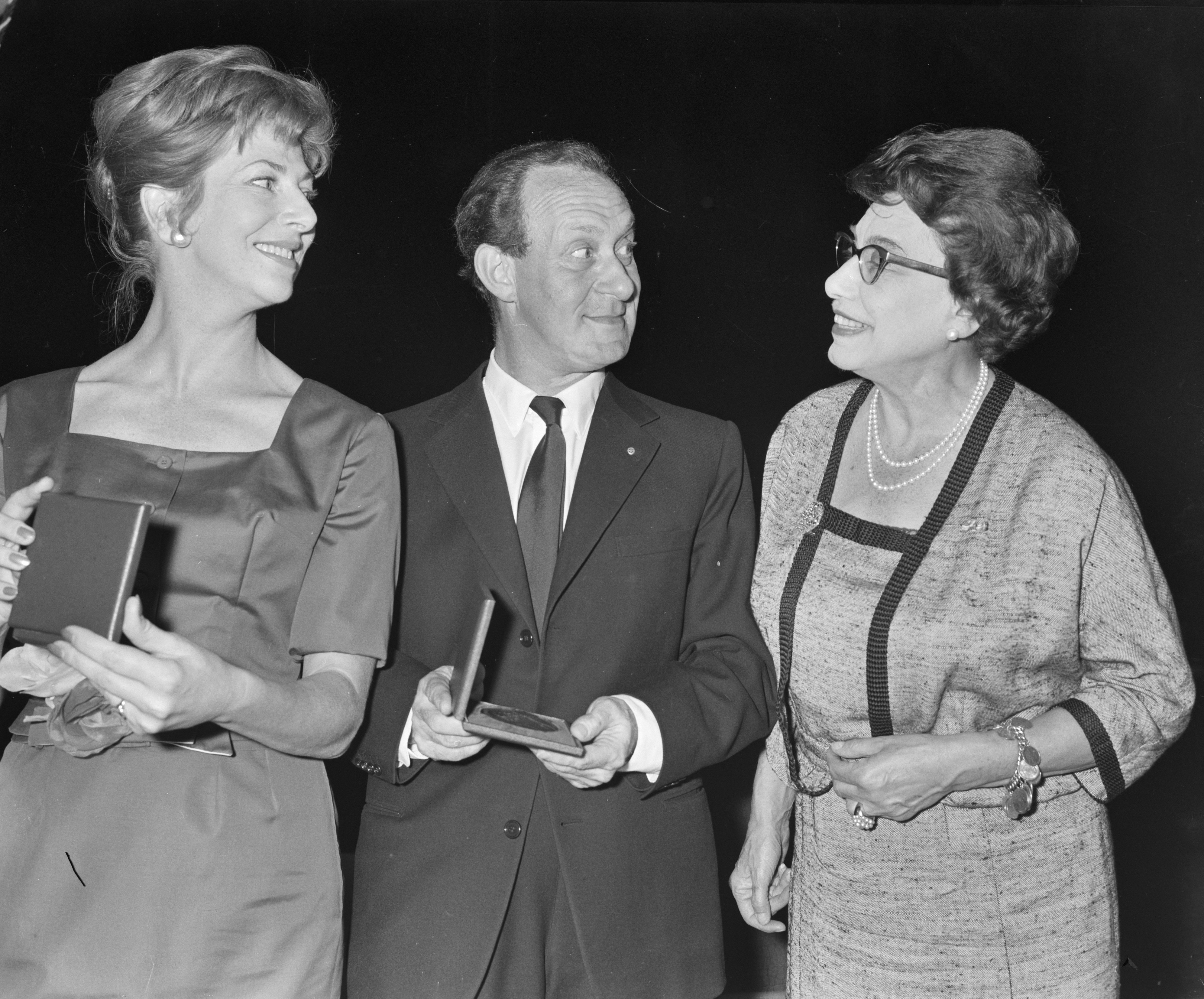 Uitreiking Bouwmeester toneelprijzen in Tilburg. Vlnr. Ellen Vogel, Bob de Lange, Fie Carelsen, 5 juni 1961. Actrice Ellen Vogel met de Theo d'Or en Bob de Lange met de Louis d'Or in gesprek met de actrice Fie Carelsen. Persoonsnamen: Fie Carelsen, Theo d'Or, Louis d'Or NB. Deze prijs bestaat sinds 1955 en wordt jaarlijks uitgereikt door de VSCD. De naam is een herinnering aan de fameuze Nederlandse actrice Theo Mann-Bouwmeester.